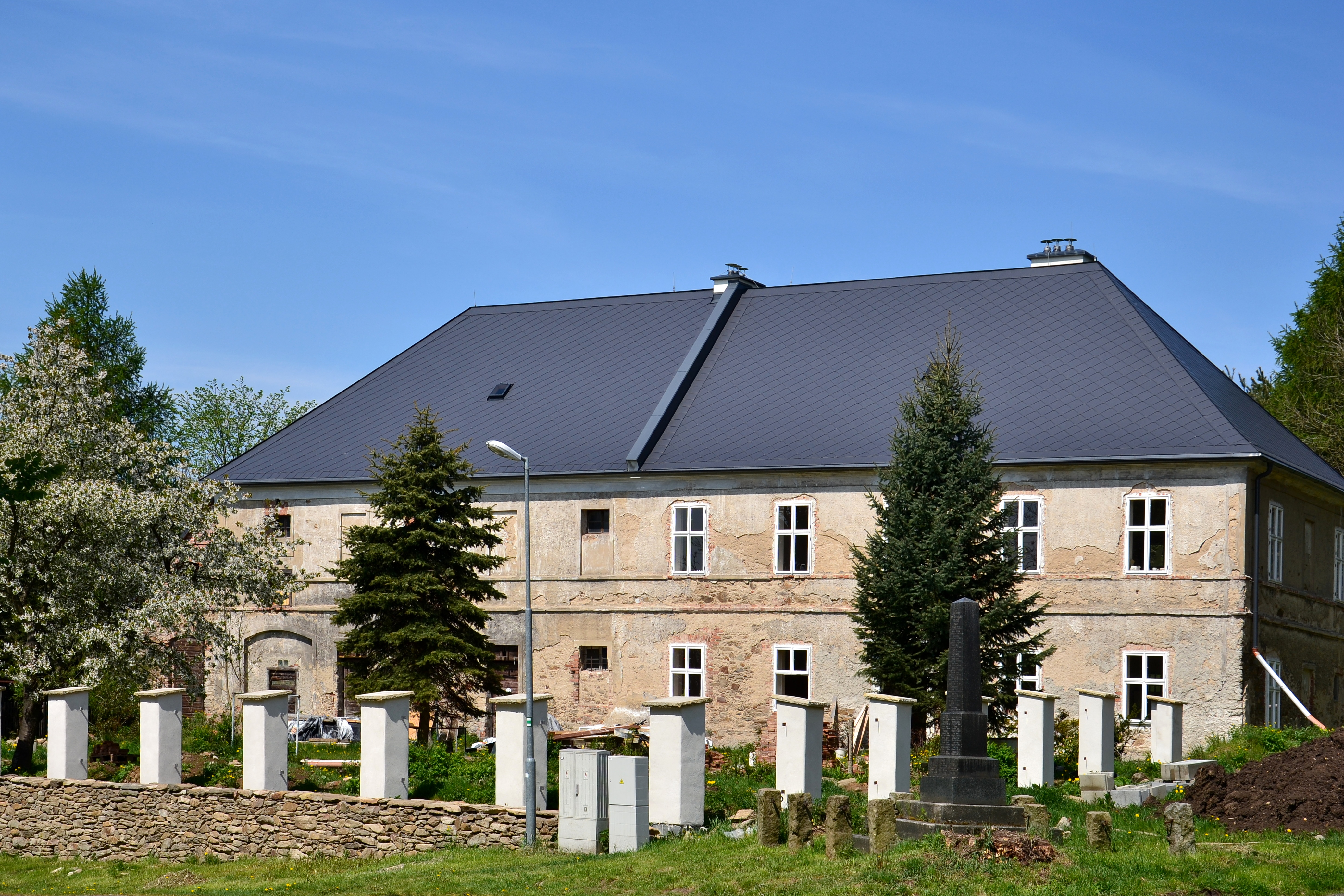 Fara, Blatno 2, Blatno (okres Chomutov).